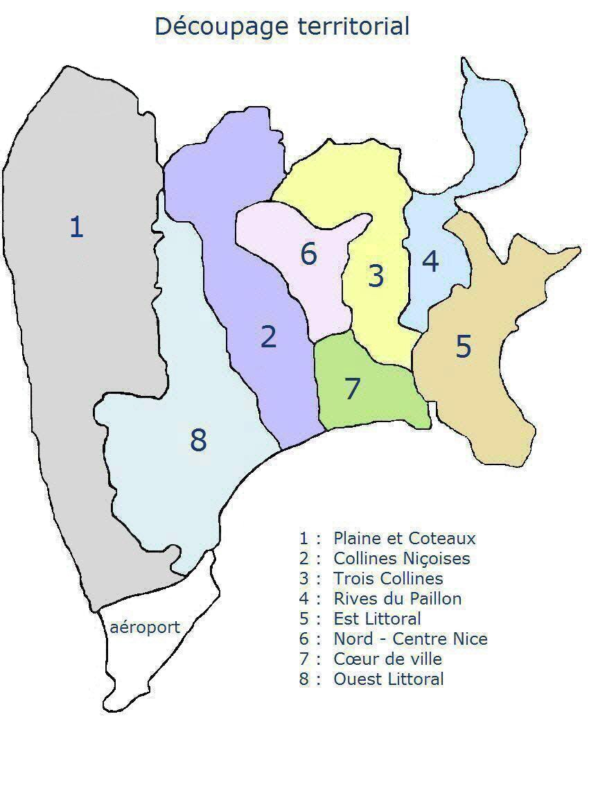 Découpage territorial de la ville de Nice, en huit territoires.